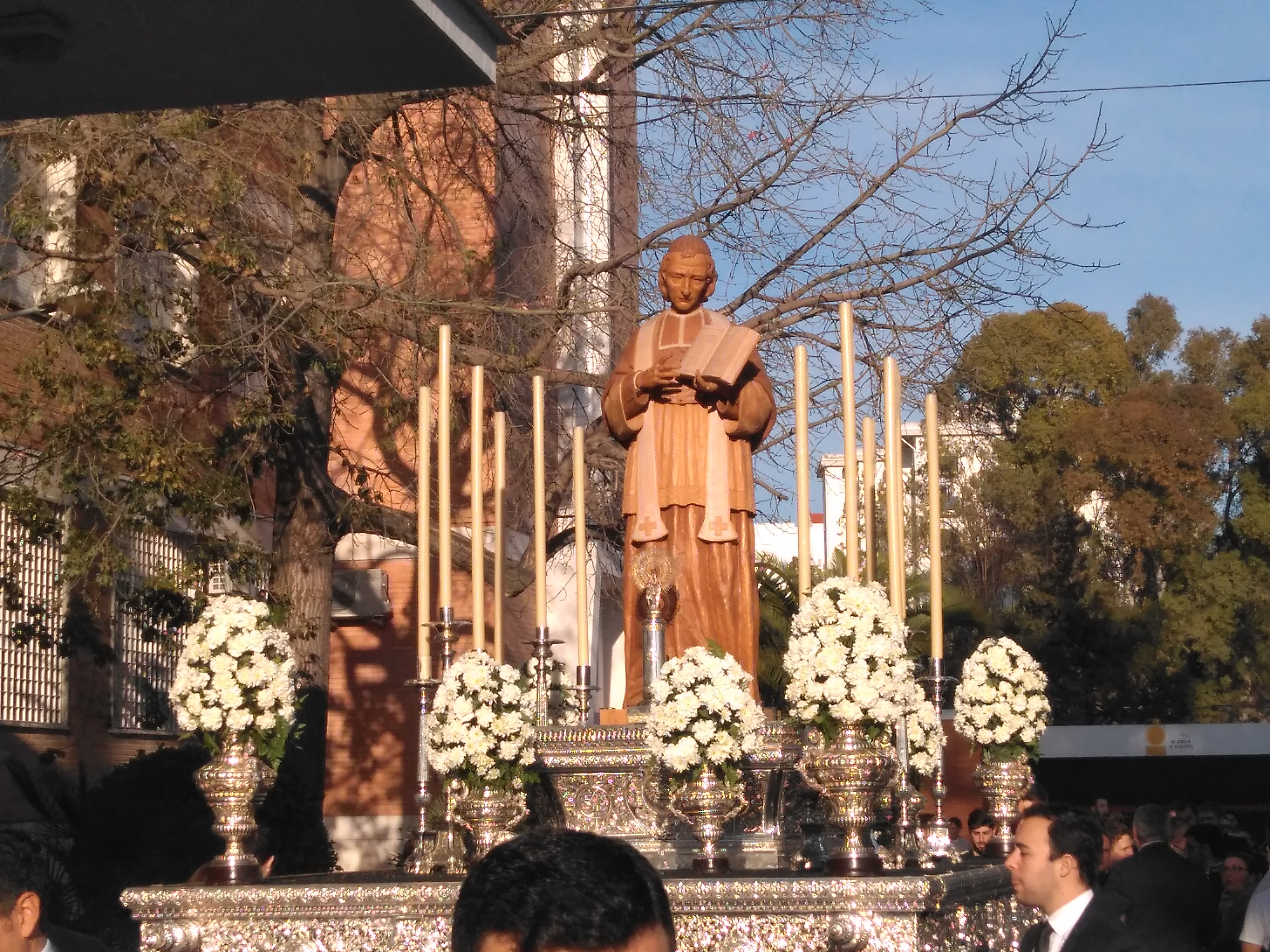 procesión Beato Guillermo José Chaminade en Jerez de la Frontera. evento final del 200 aniversario de los Marianistas, sobre el paso de Nuestra Señora de las Lágrimas de la Hermandad de la Vera-Cruz